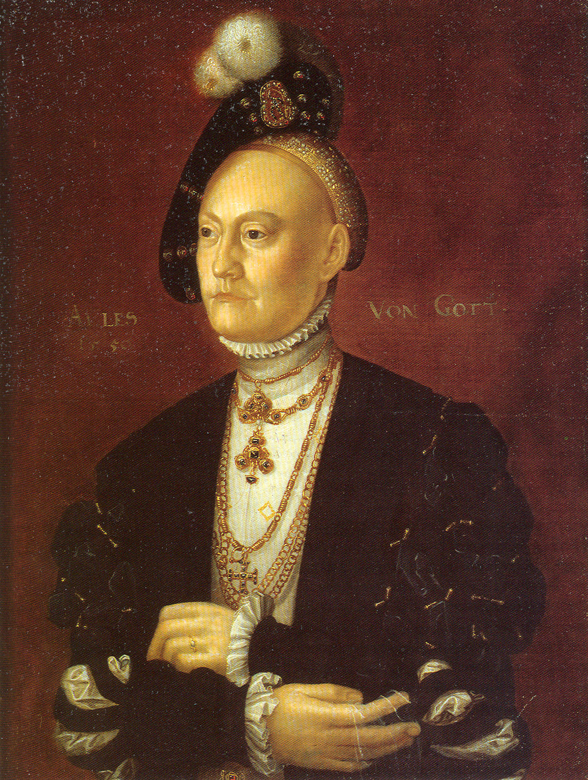 Dorothea von Sachsen-Lauenburg-Ratzeburg (* 9. Juli 1511 in Lauenburg; † 7. Oktober 1571 in Sonderburg), Königin von Dänemark und Norwegen